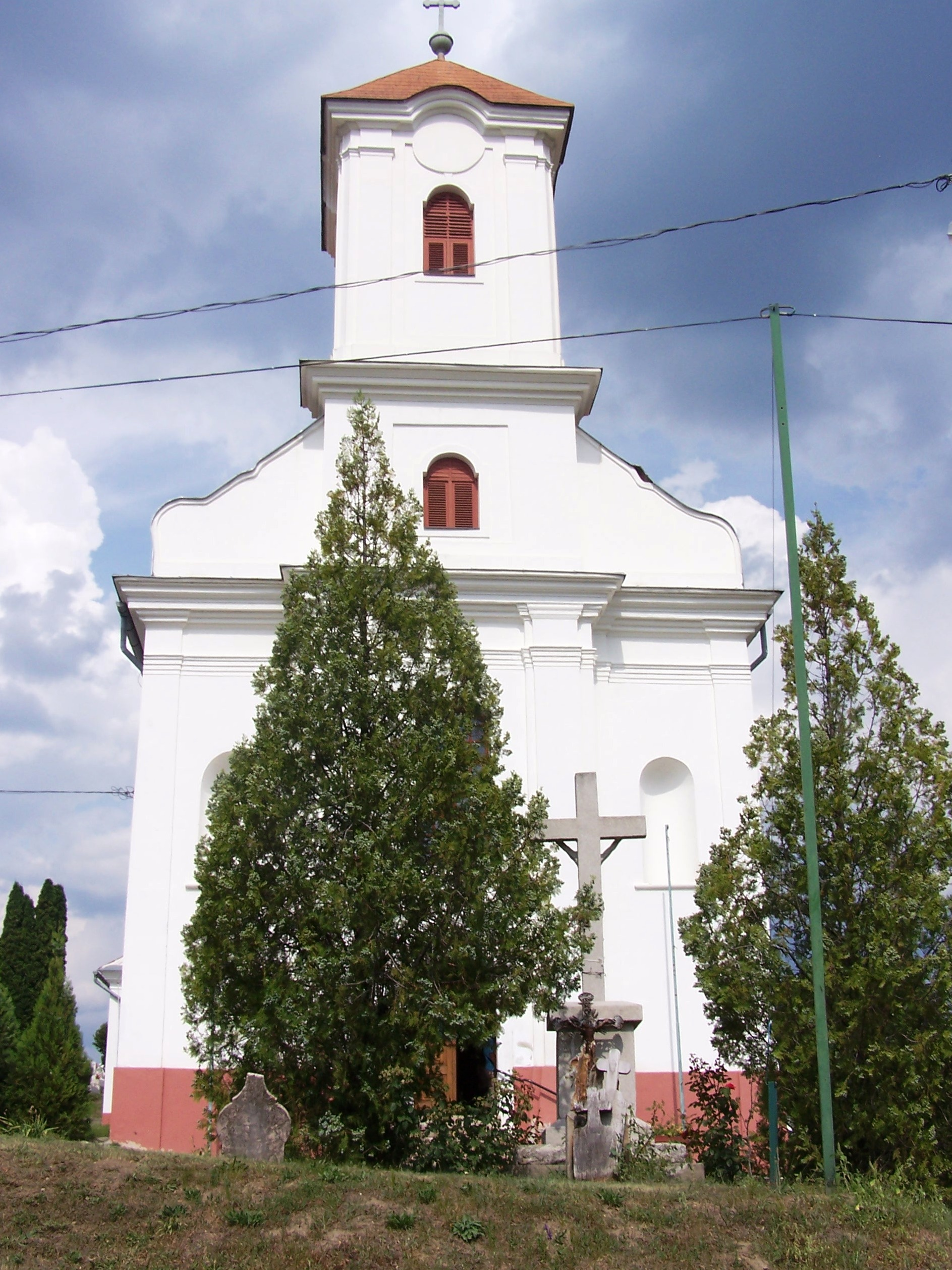 Római katolikus templom (Szent Kereszt felmagasztalása) (Szurdokpüspöki, Püspöki, I. ker. Zagyvaszentjakabi temető, Arany János u. 20.)